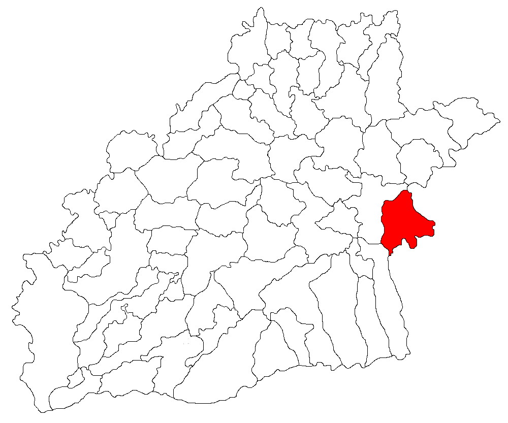 Categorie:Hărţi ale judeţului Sibiu